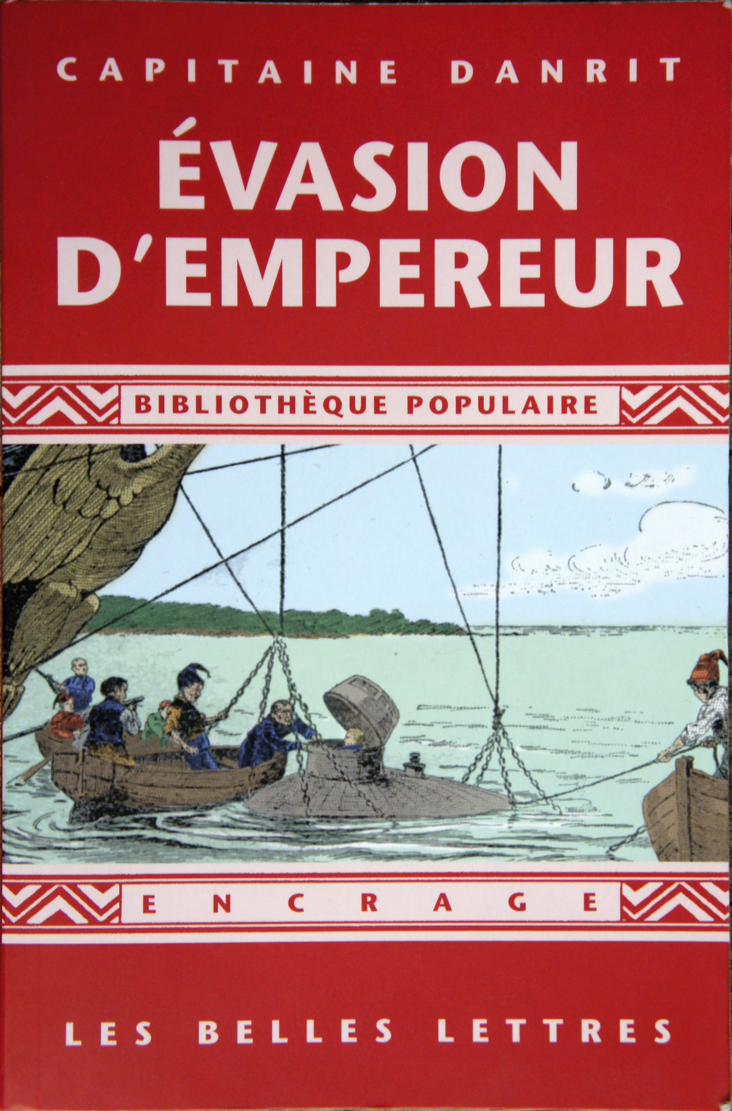 Présenté au Musée Émile Driant.